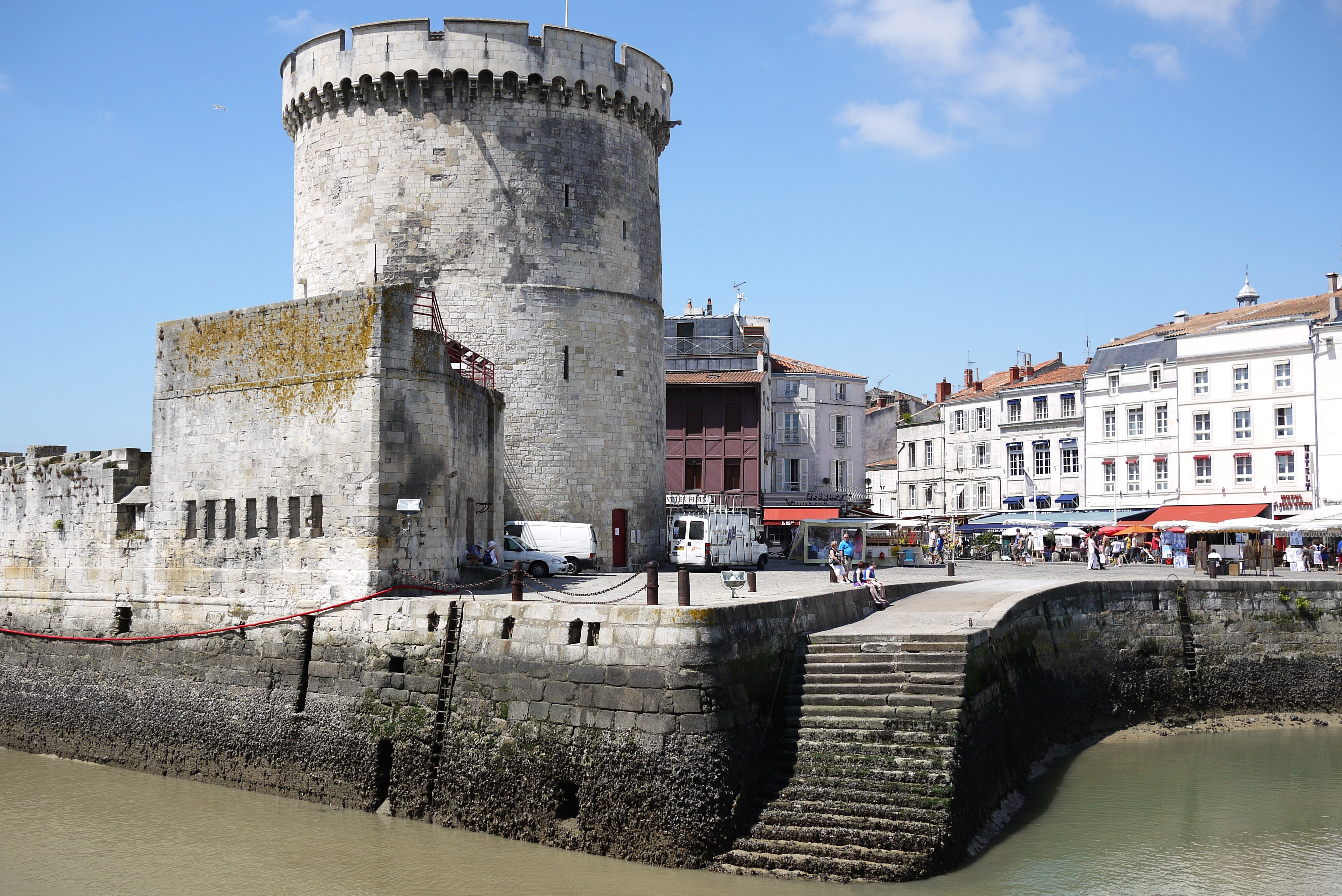 La Tour de la Chaîne et l' Escalier des Sardiniers à La Rochelle. En arrière plan on aperçoit la Place de la Chaîne et les restaurants. La Rochelle, Charente Maritime, France.